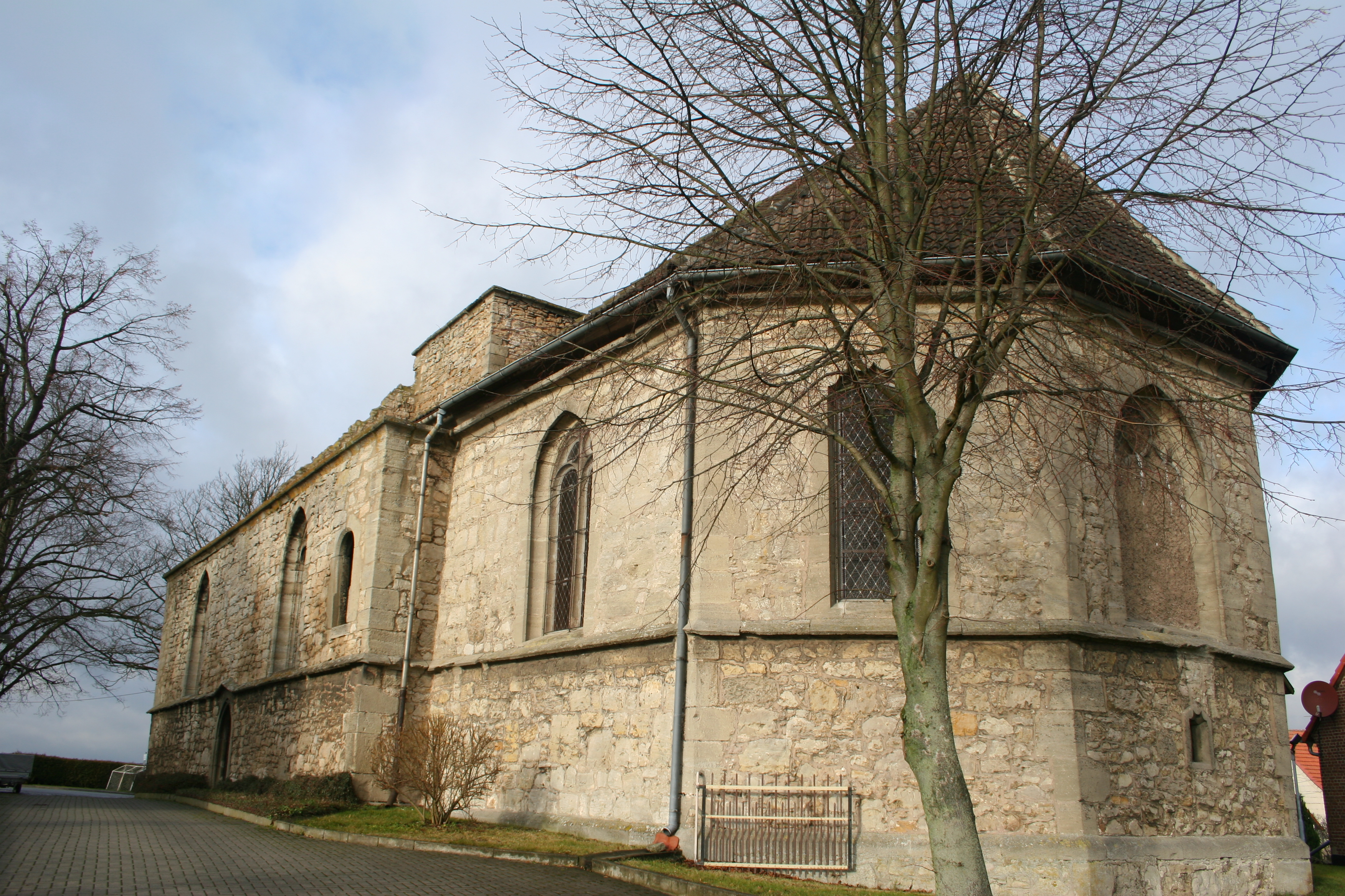 Ostansicht der Ruine der Kirche in Katharinenberg Ort im Unstrut-Hainich-Kreis in Thüringen.jpg